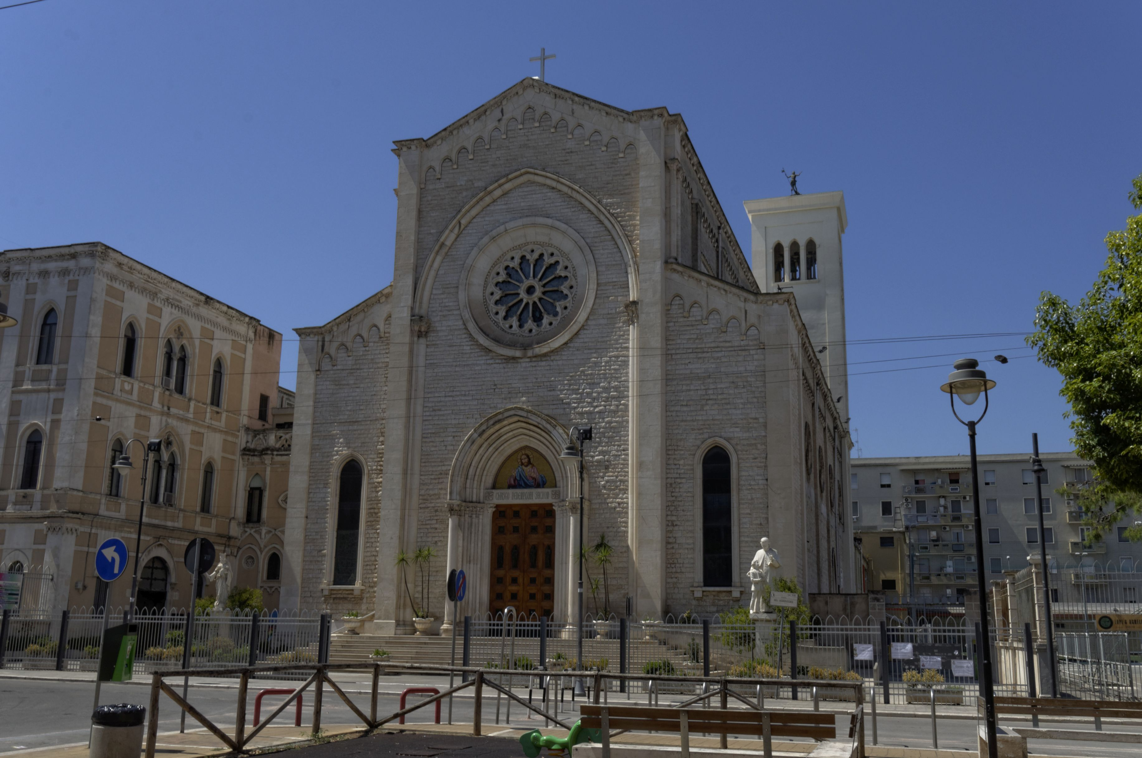 Bari 2017